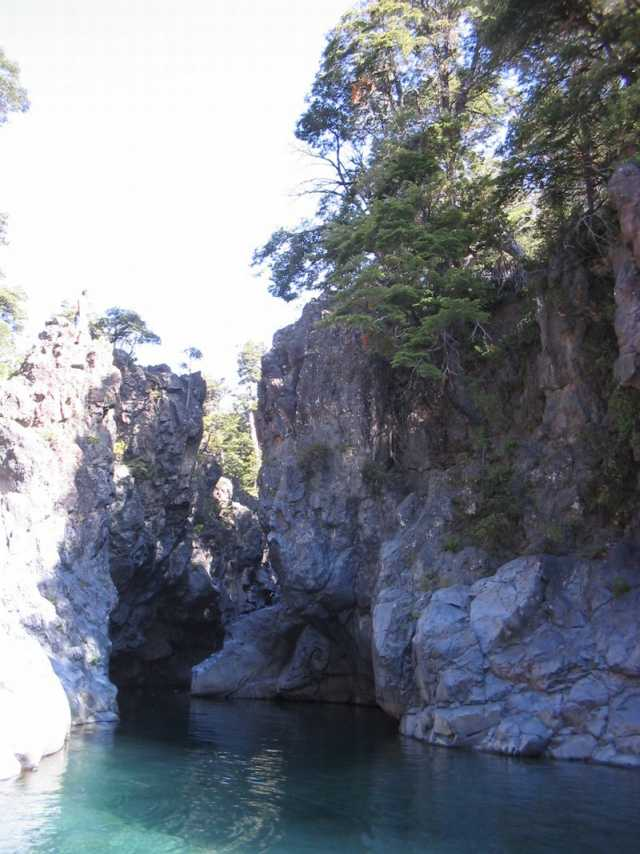 Pozones formados a lo largo del río Claro, donde es posible practicar natación) (última modificación.